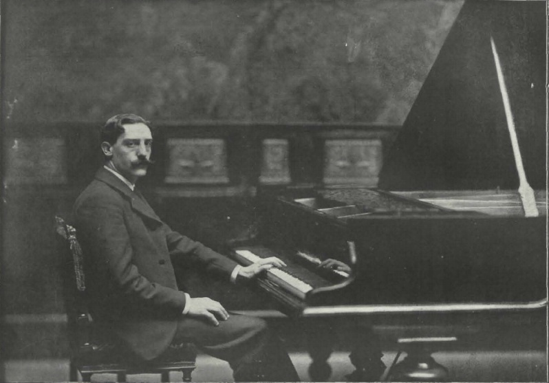 Fotografía de Joaquín Malats realizada por Pablo Audouard